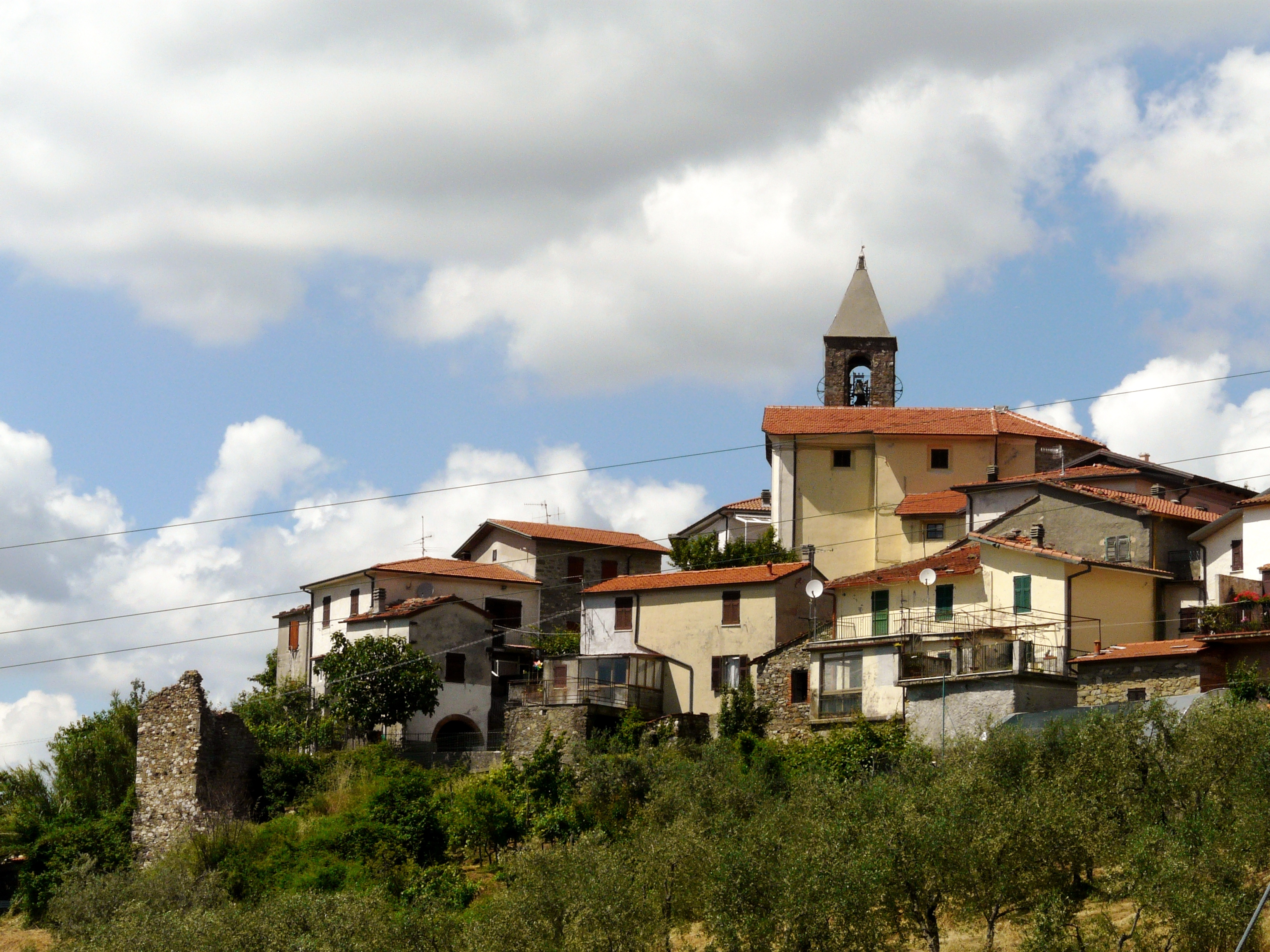 Panorama di Casciana (Casola in Lunigiana), Toscana, Italia